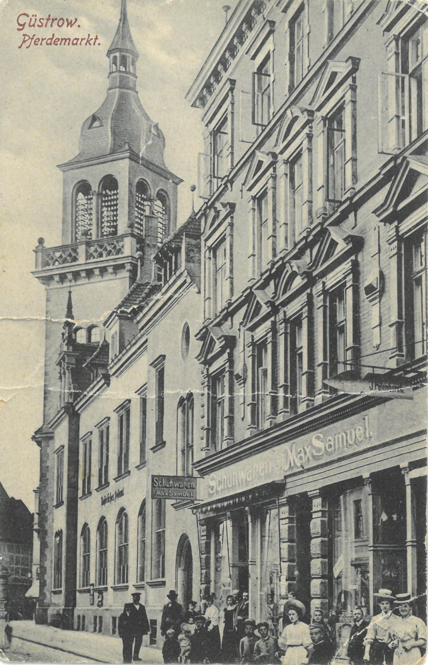 Geschäftshaus Pferdemarkt 57 mit Schuhgeschäft, links daneben die Post mit Turm, Ansicht um 1910.